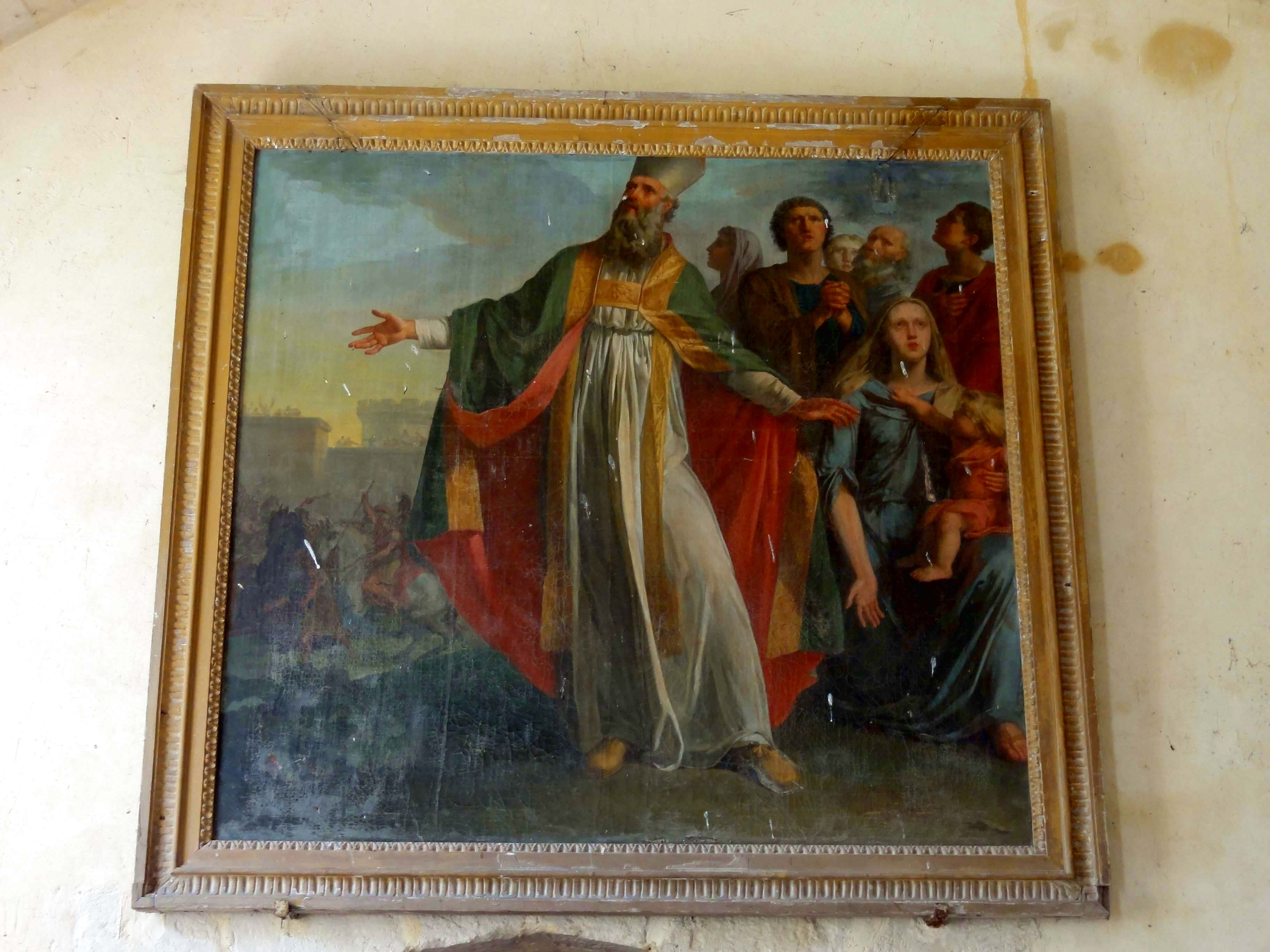 Mobilier de l'église (voir titre).